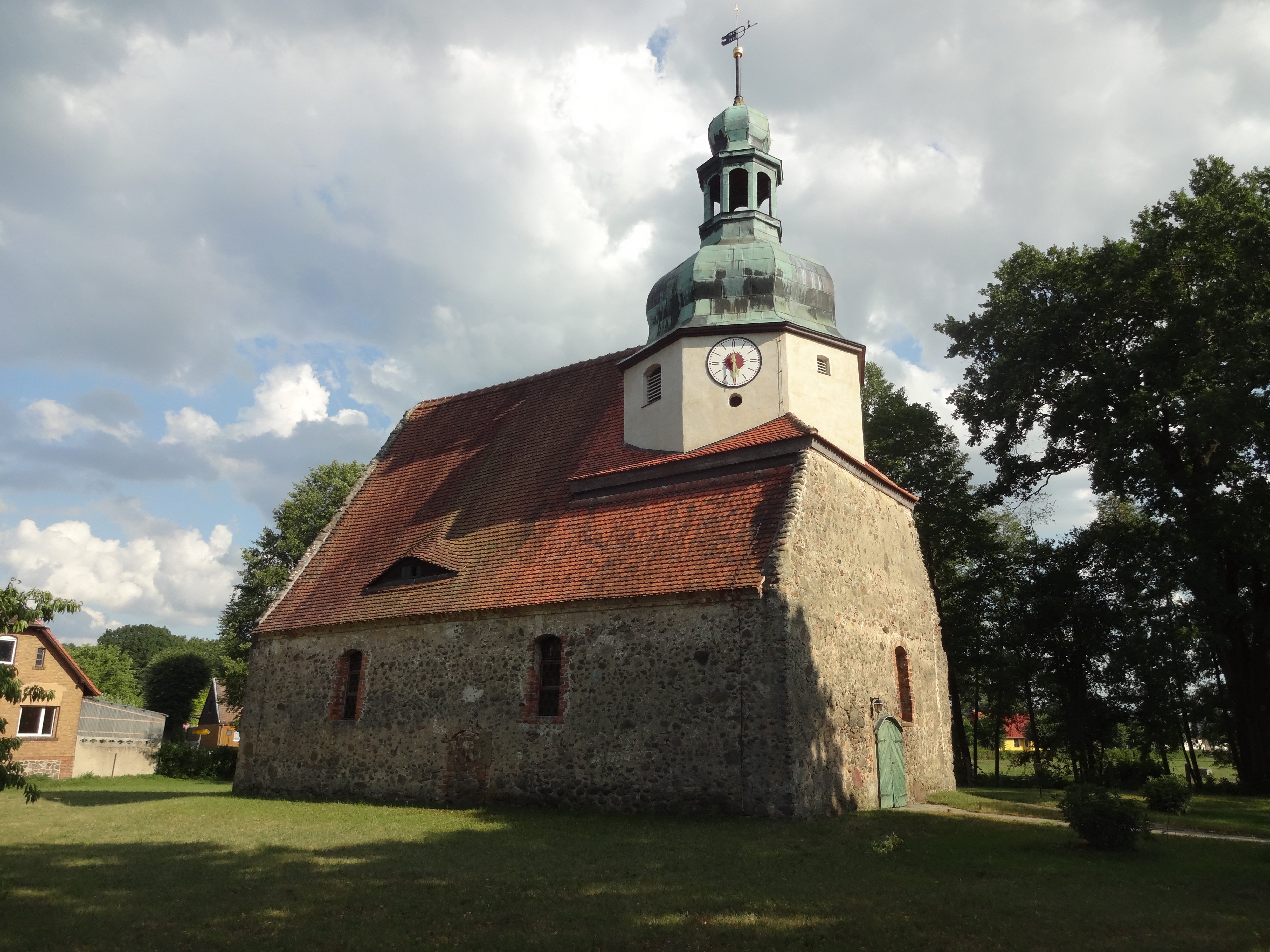 denkmalgeschützte Dorfkirche in Bronkow